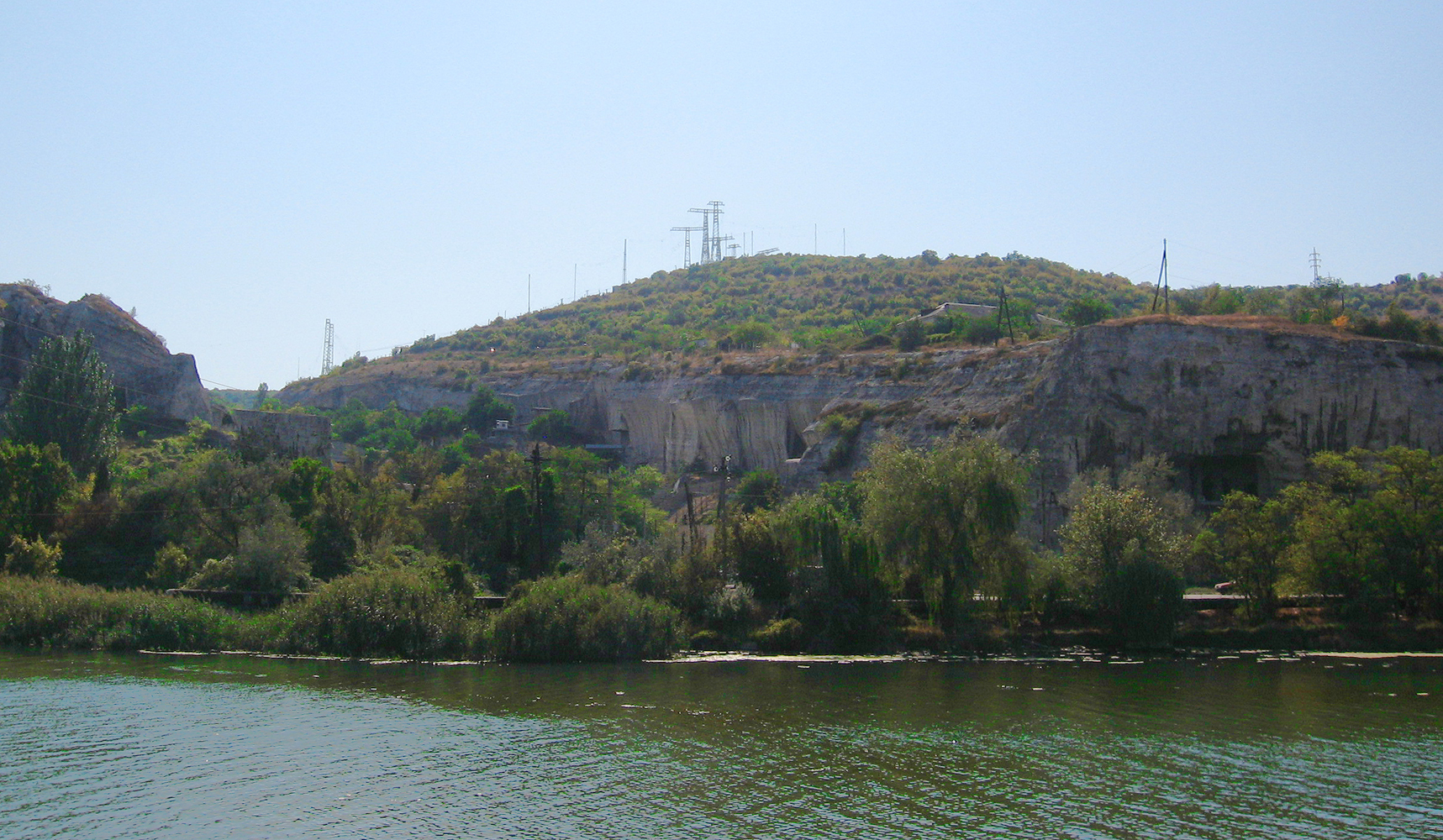 Каменоломенный овраг в Инкермане, место ссылки Климента Римского